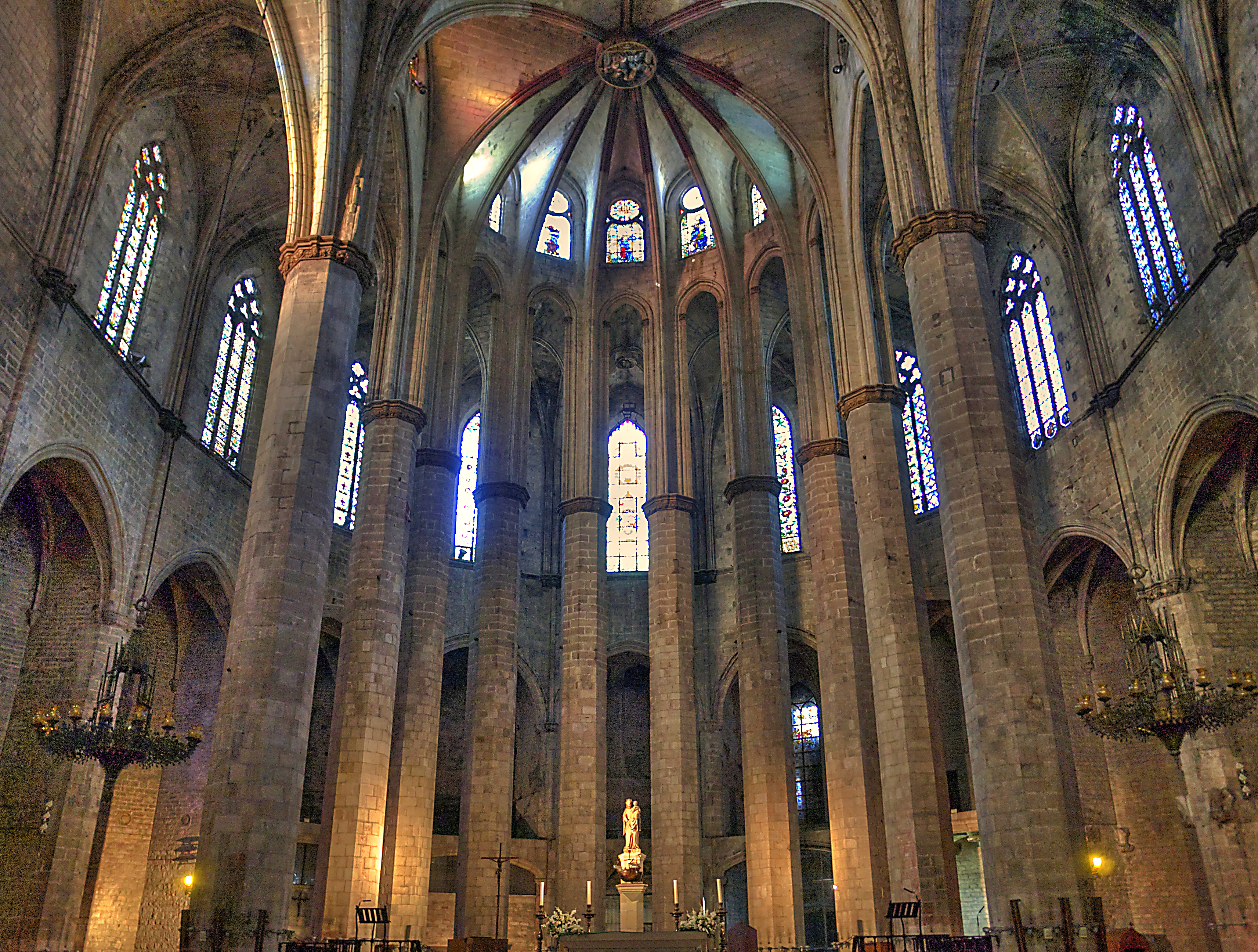 Santa Maria Del Mar-interior